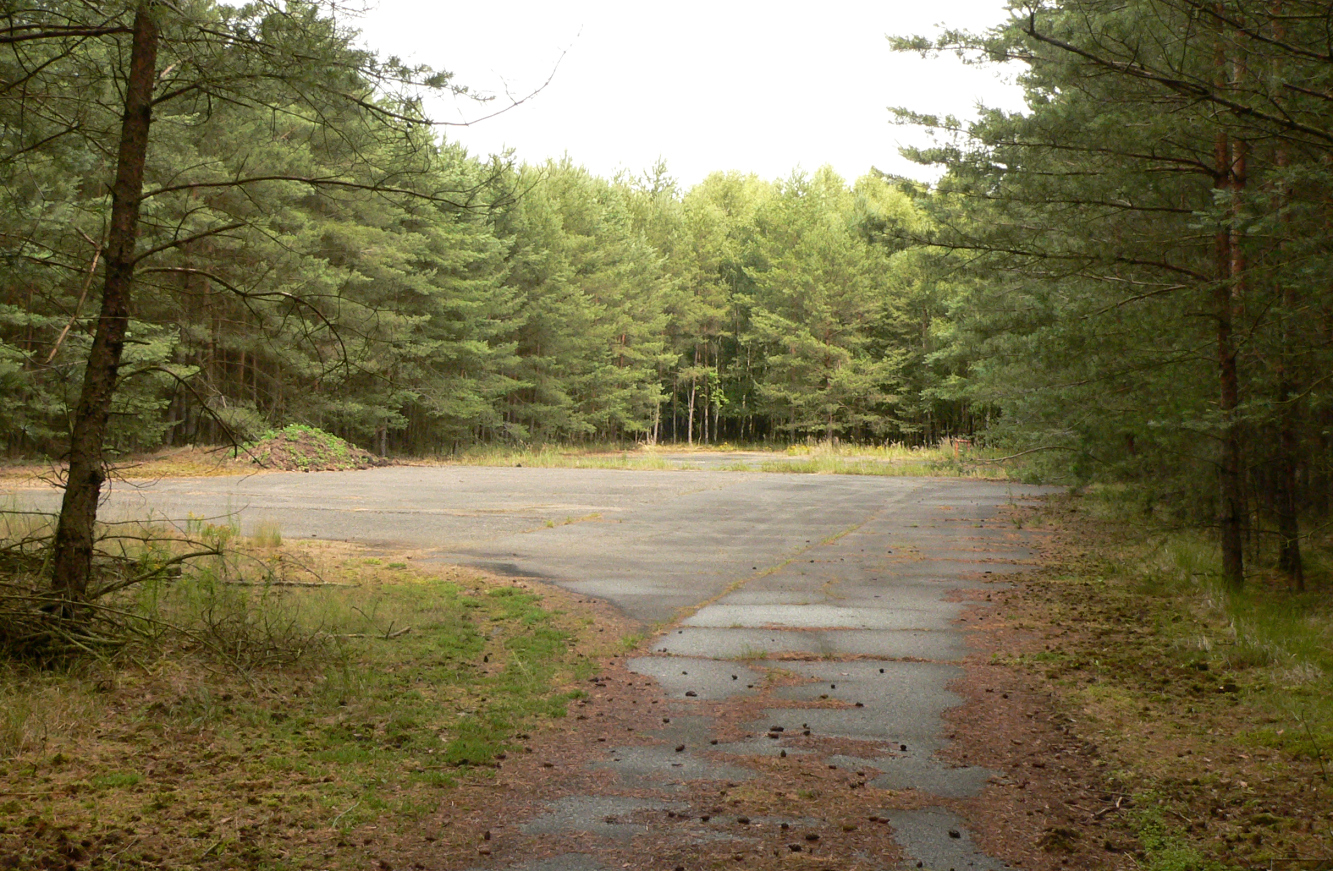 Die ehemalige Tiefbohrstelle 10004 bei Gorleben heute